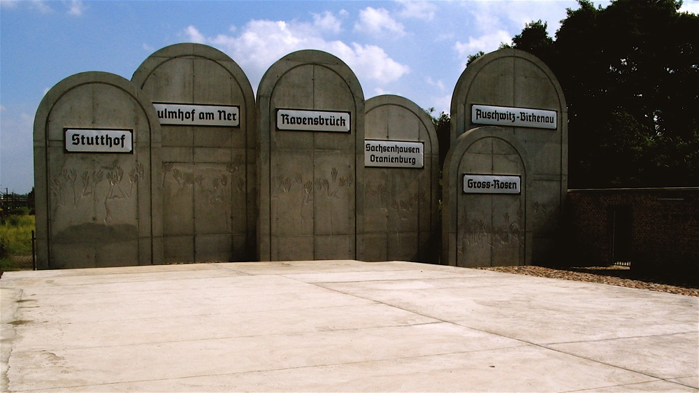 Stacja Radegast w Łodzi